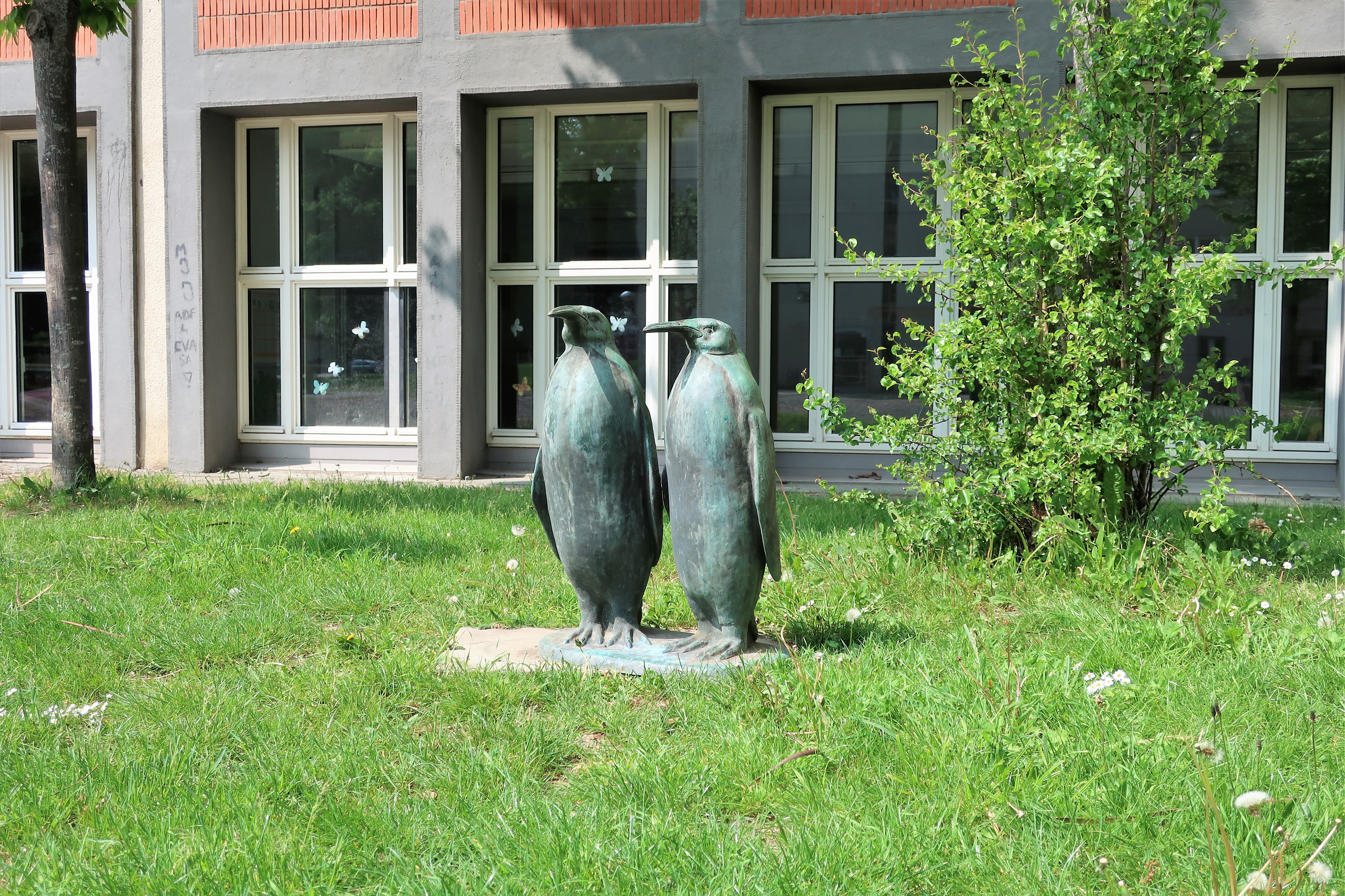 Bronze-Skulptur „Pinguine“ (77cm hoch) auf dem Schulhof des Ricarda-Huch-Gymnasiums in Hagen, Voswinckelstraße 1. Erschaffen von Heinrich Hawick. Kunst im öffentlichen Raum in Hagen.